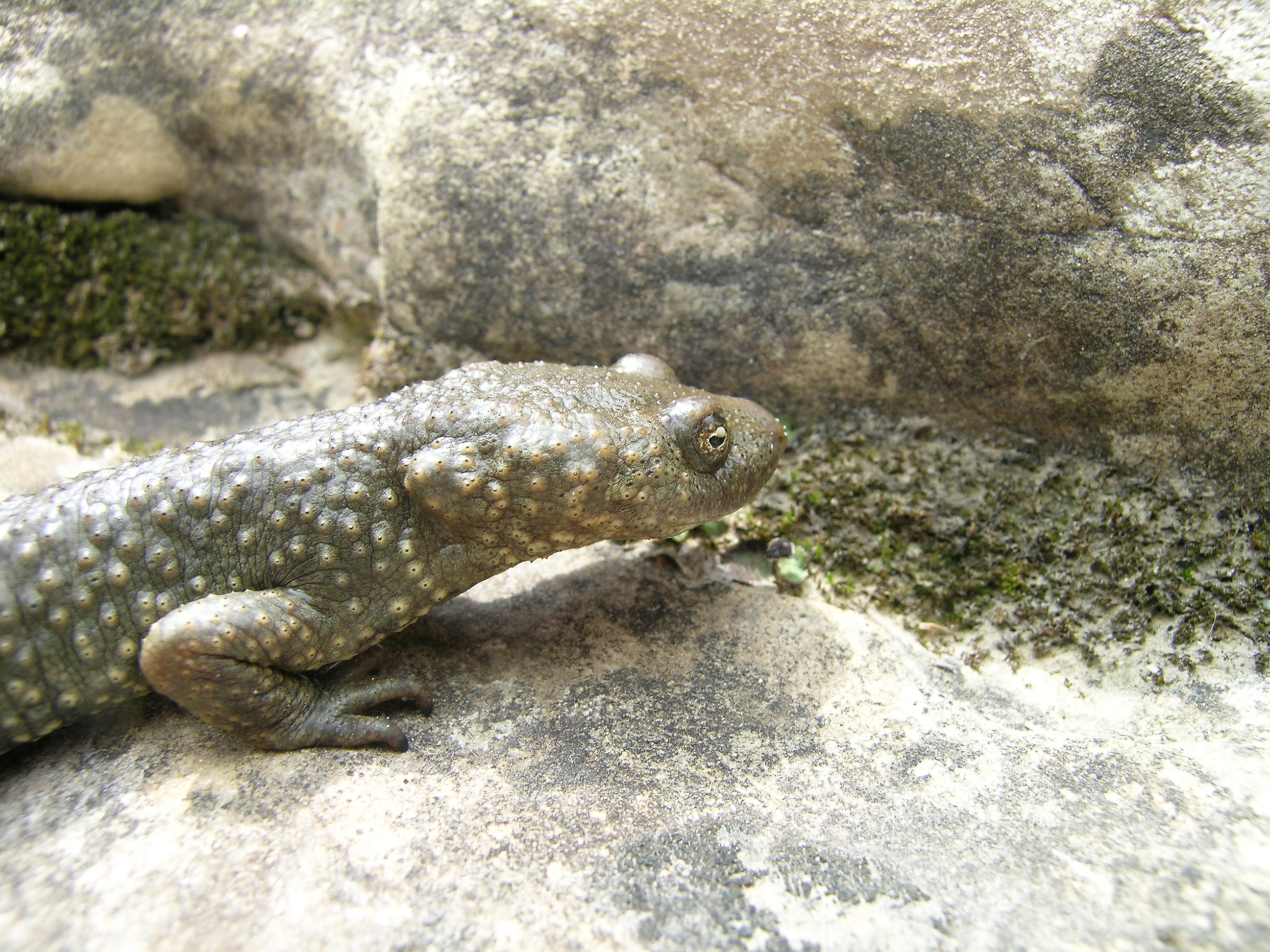 Pyrenean Brook Salamander